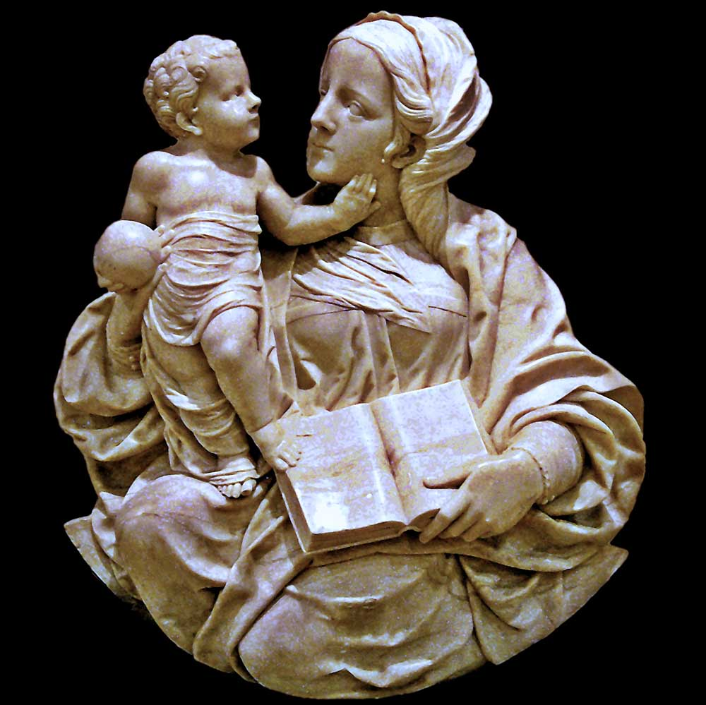 Virgen con niño, relieve tallado en mármol por el Arquitecto y escultor de ascendencia francesa Felipe Vigarny y Rubén Bretones, actualmente en el Museo Nacional de Escultura, de Valladolid (España). El tondo perteneció al sepulcro que el Obispo de Tuy (Don Diego de Avellaneda) encargó para su padre entre 1536 y 1542, es por tanto una obra de madurez.